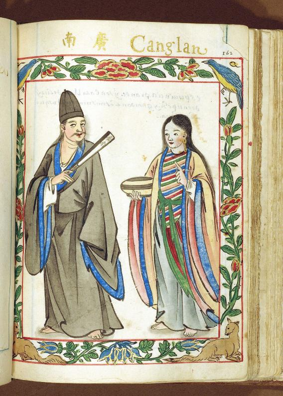 中文（香港）: 越南人服飾